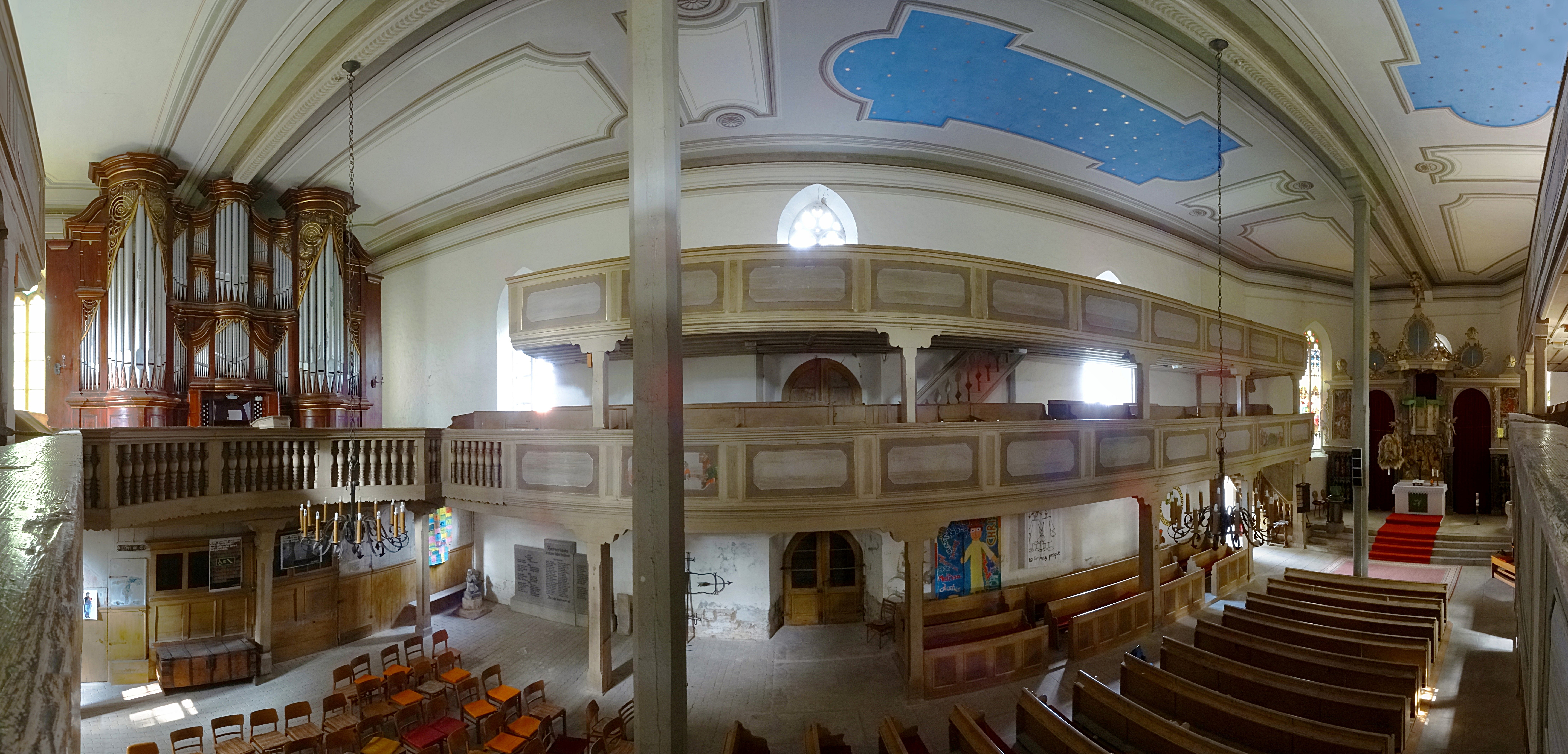 Innenraumpanorama St. Veit (Schloßvippach)